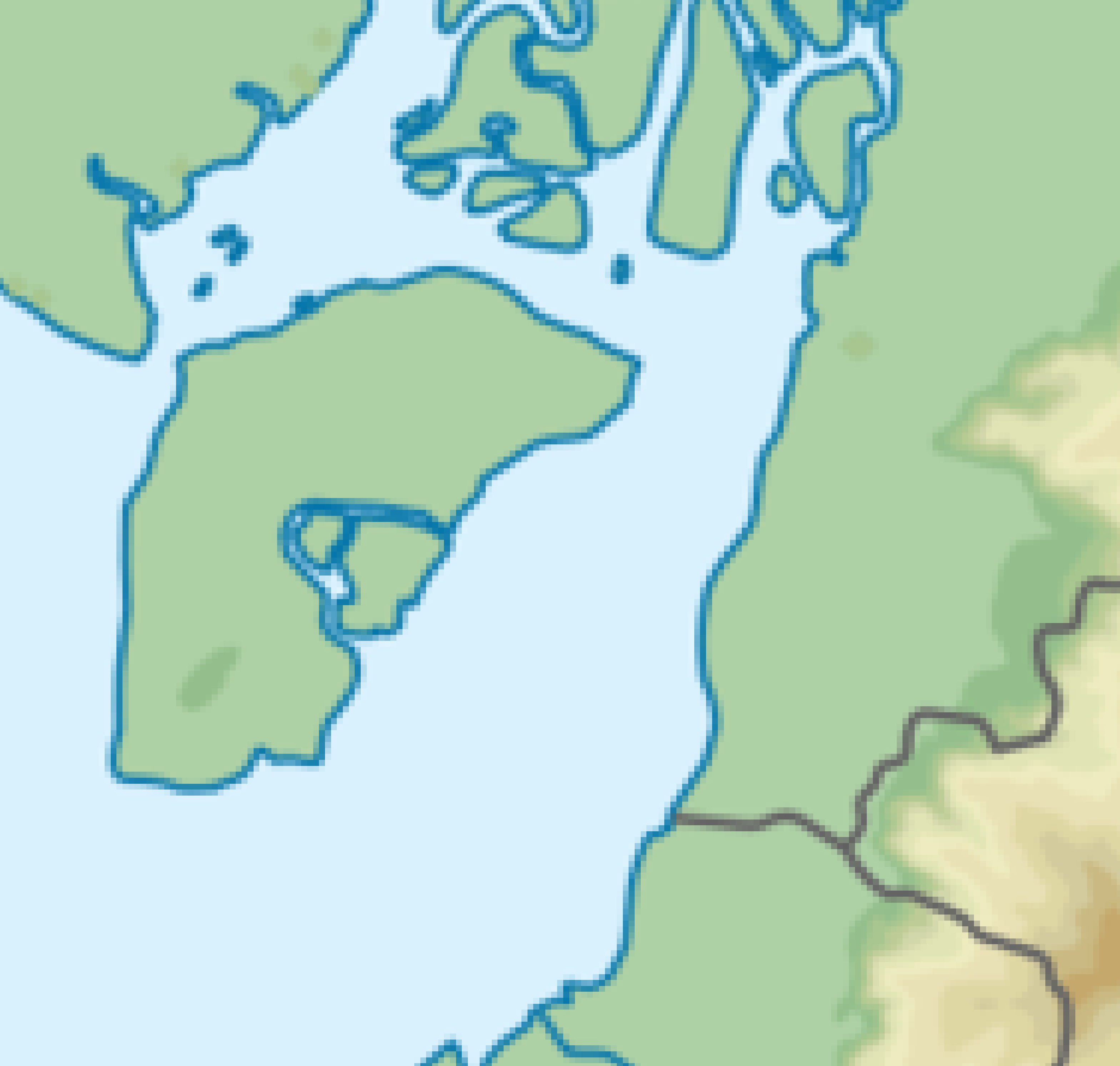 Canal de Jambeli en Ecuador